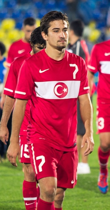 Aydın Yılmaz, Türkiye A2 Milli Takımı formasıyla.